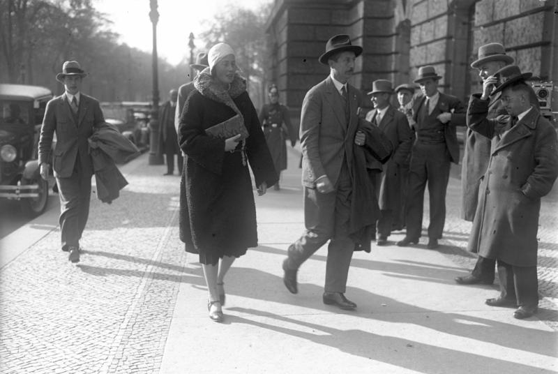 Die Wahl des Reichstagspräsidenten in Berlin! Aufnahmen prominenter Parlamentarier auf dem Wege zum Reichstag zur Wahl des Reichstagspräsidenten! Prinz August Wilhelm [von Preußen] begibt sich mit seiner Gattin als Zuhörer in den Reichstag.